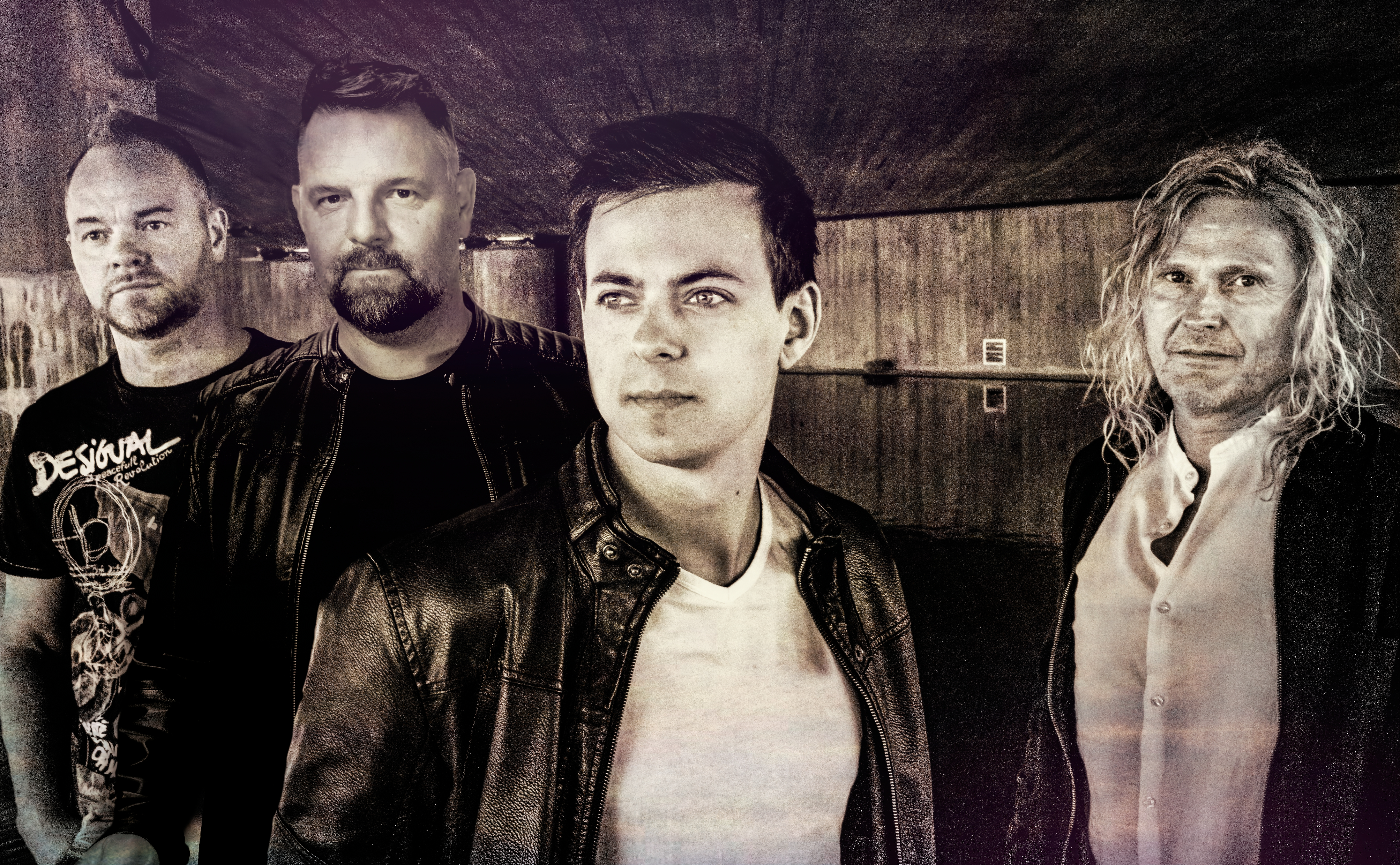 Nåværende medlemmer i Stoneflower fra venstre: Svenn Huneide, Geir Johnny Huneide, John Masaki, Tom Sennerud